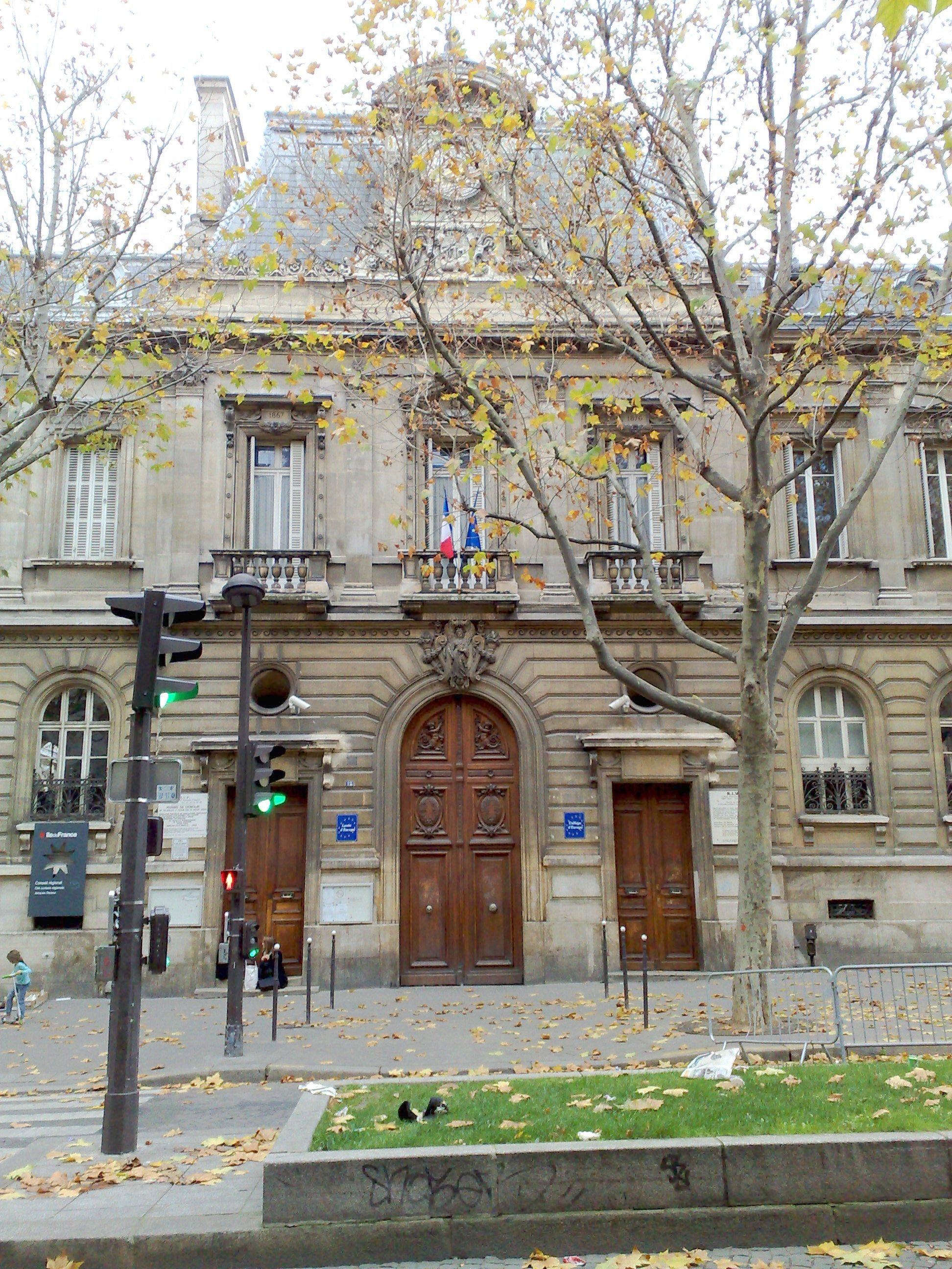 Façade principale du Lycée Jacques-Decour